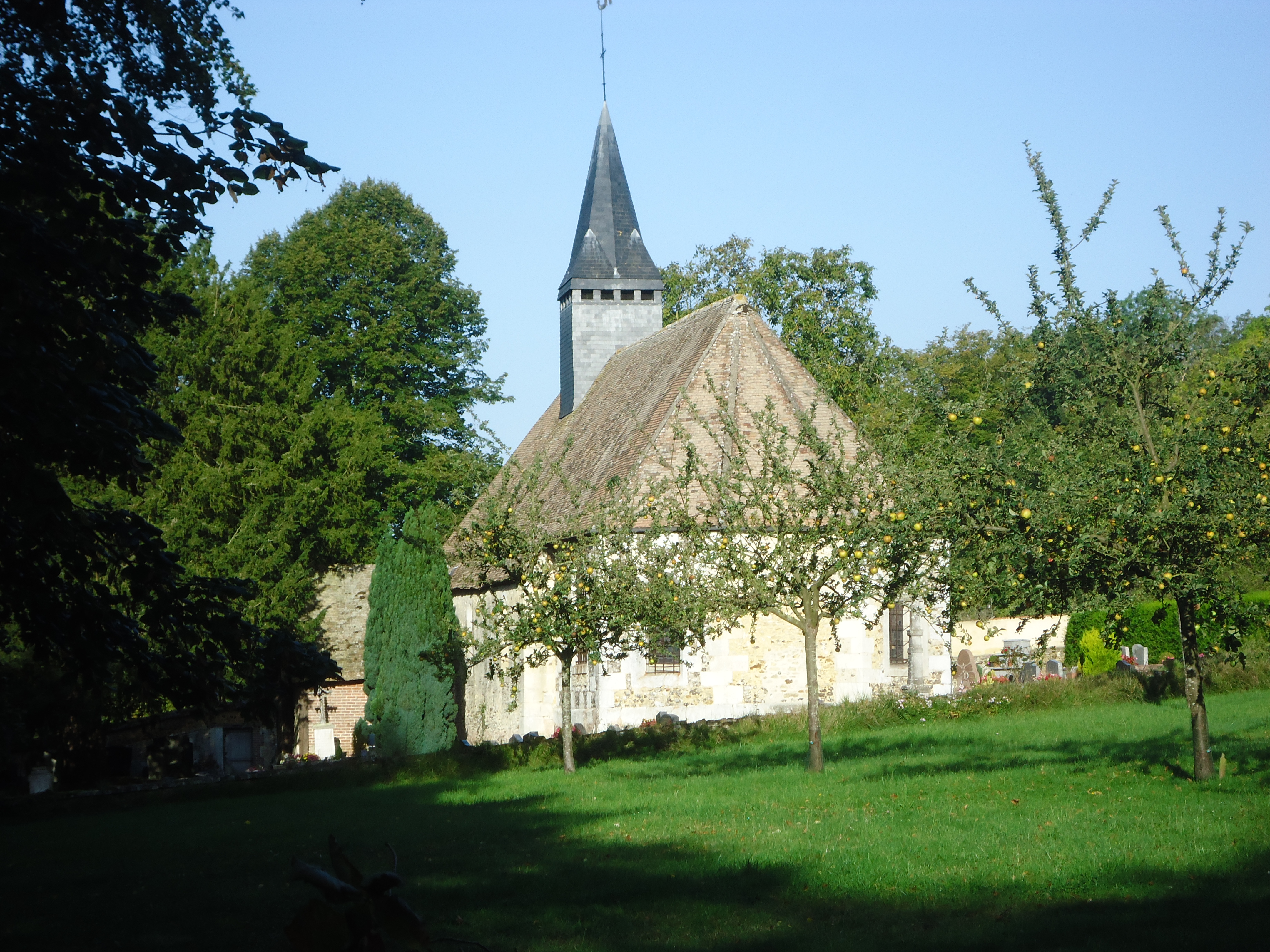 Église Sainte-Barbe - Site classé - Sainte-Barbe-sur-Gaillon - Eure (27)